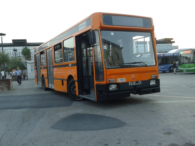 Iveco 480.10 Turbocity matricola 402 in sosta al Terminal di Piazzale Republica